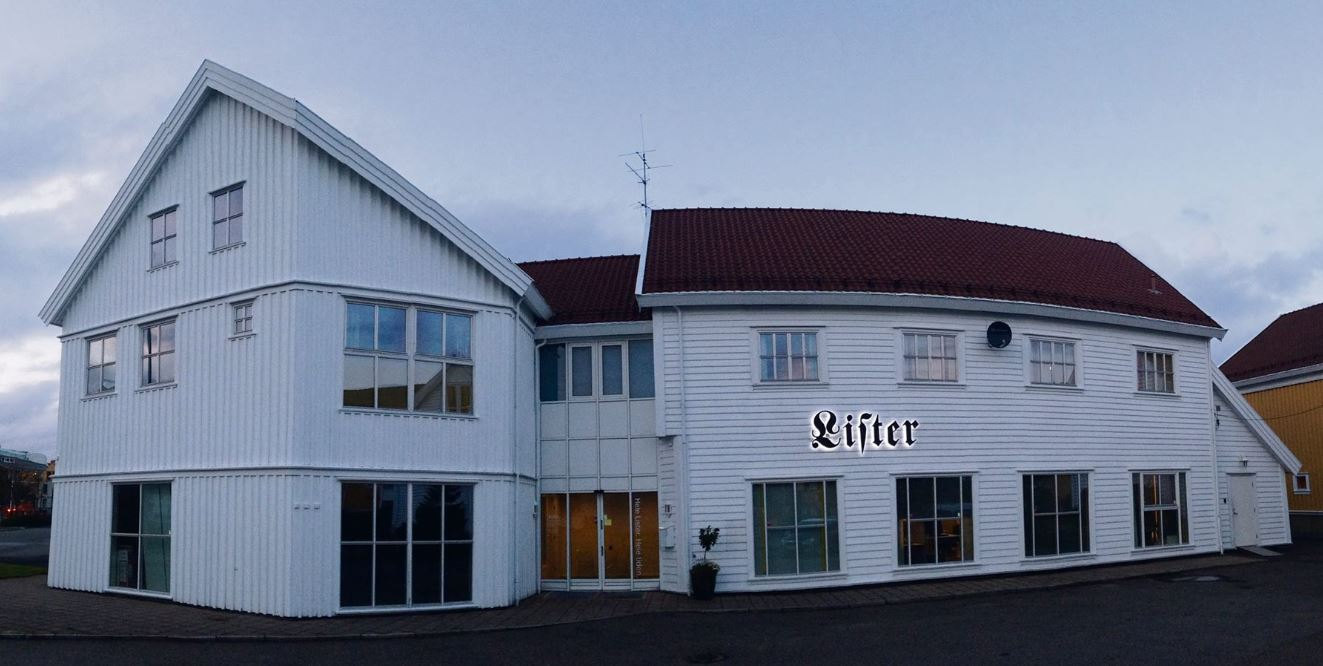 Avisens lokaler på Gåseholmen i Farsund.